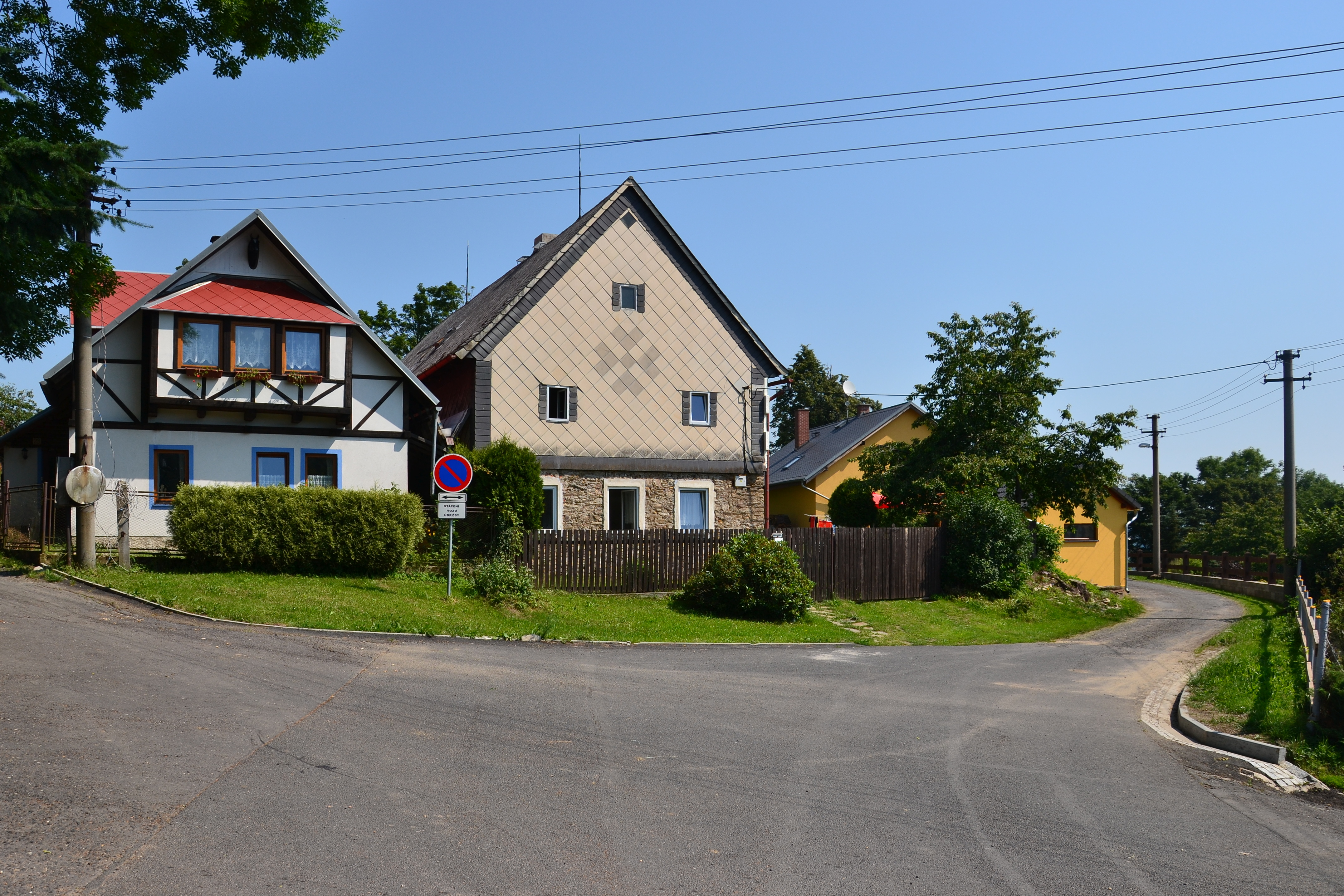 Domy na návsi